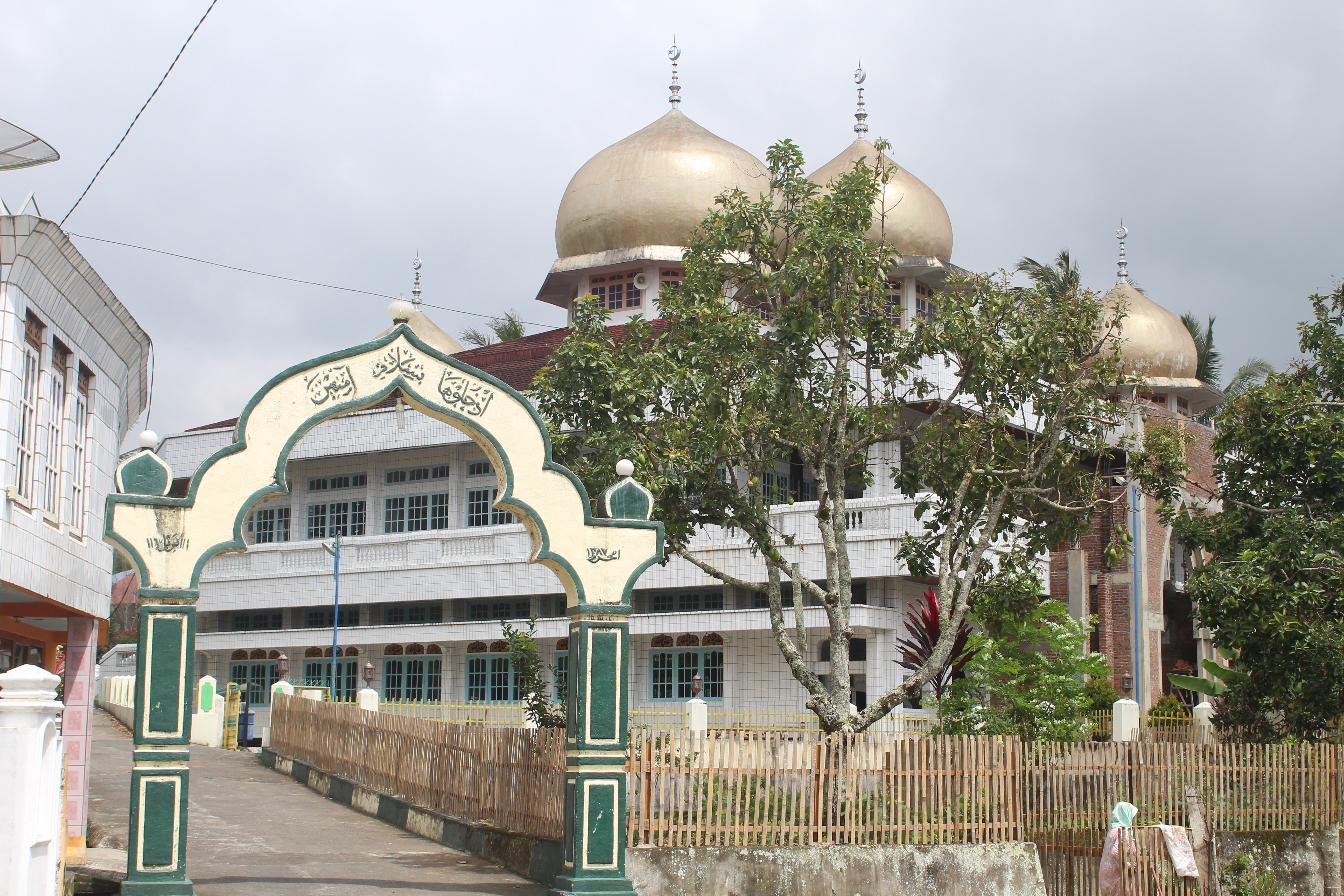 Masjid Sungai Jambu di Jorong Sungai Jambu, Nagari Sungai Jambu, Kecamatan Pariangan, Kabupaten Tanah Datar, Sumatra Barat, Indonesia.